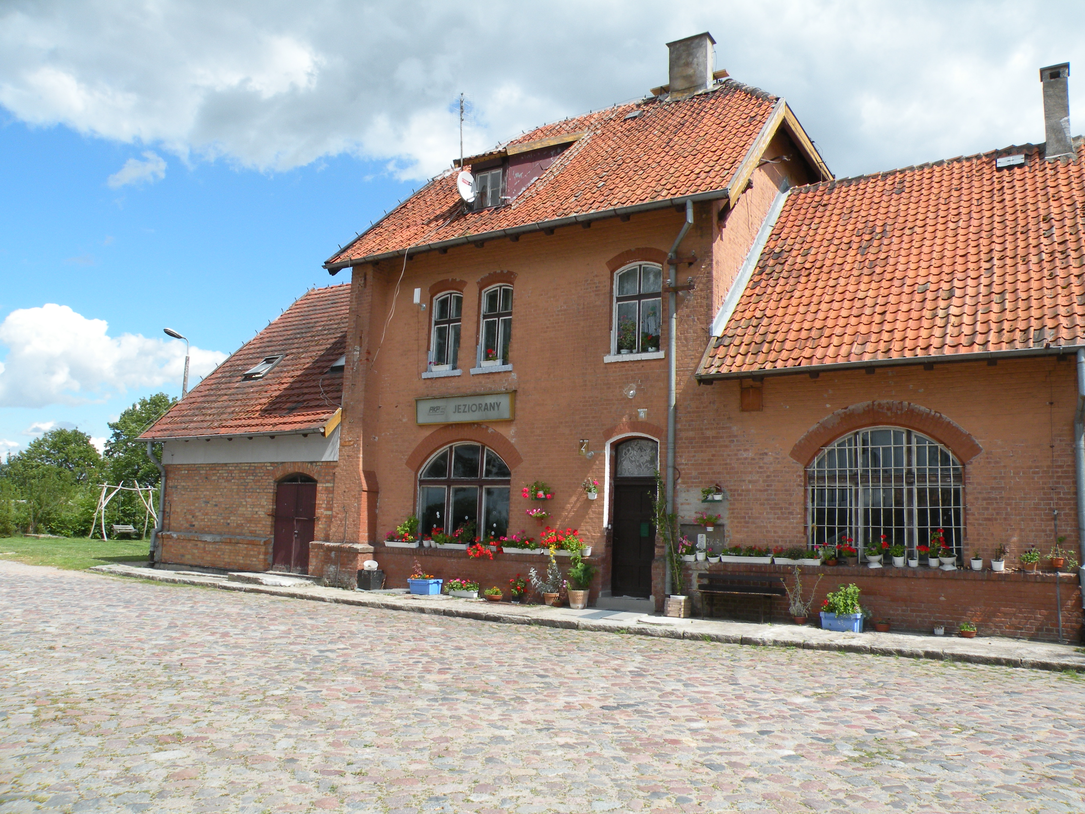 Jeziorany, dawna stacja kolejowa, linia nie jest czynna.